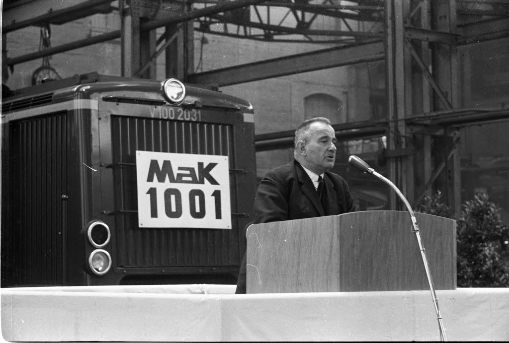 Auslieferung der 1000. und 1001. Diesellokomotive. Im Bild MaK-Eigentümer Hugo Stinnes am Rednerpult.